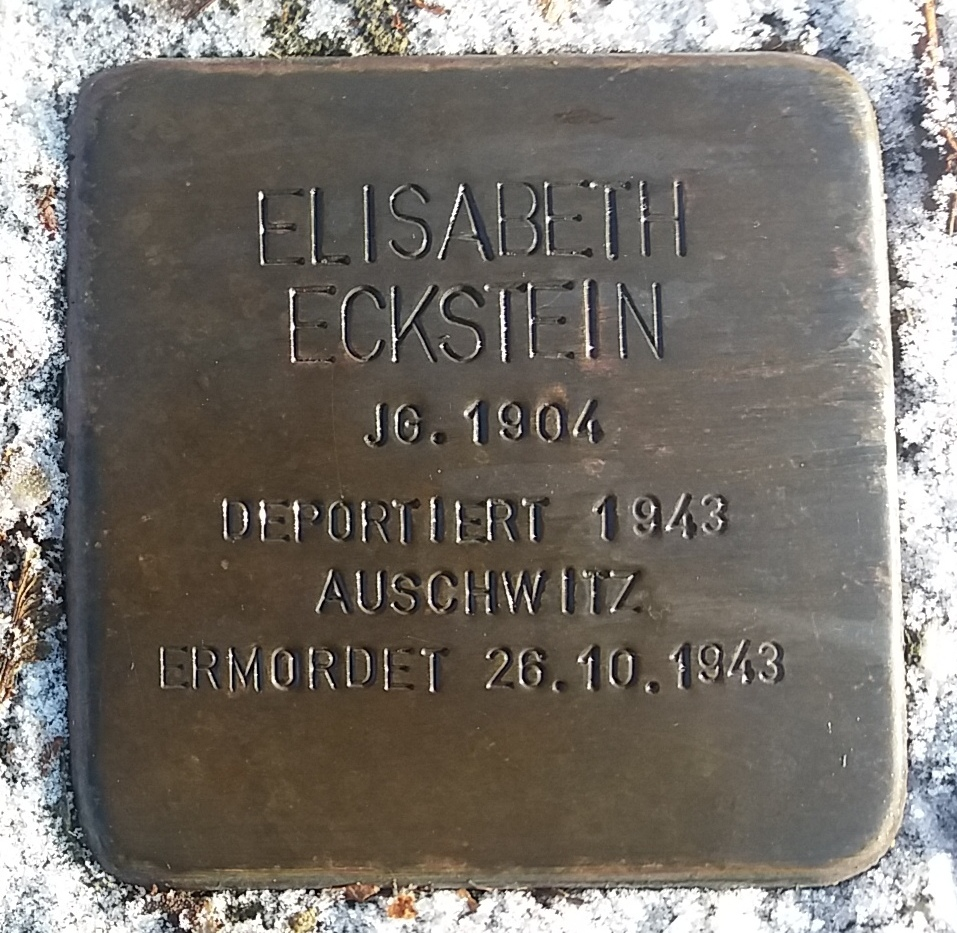 Stolperstein für Elisabeth Eckstein, Mitglied der Großfamilie Eckstein, Vöhringen (Iller)